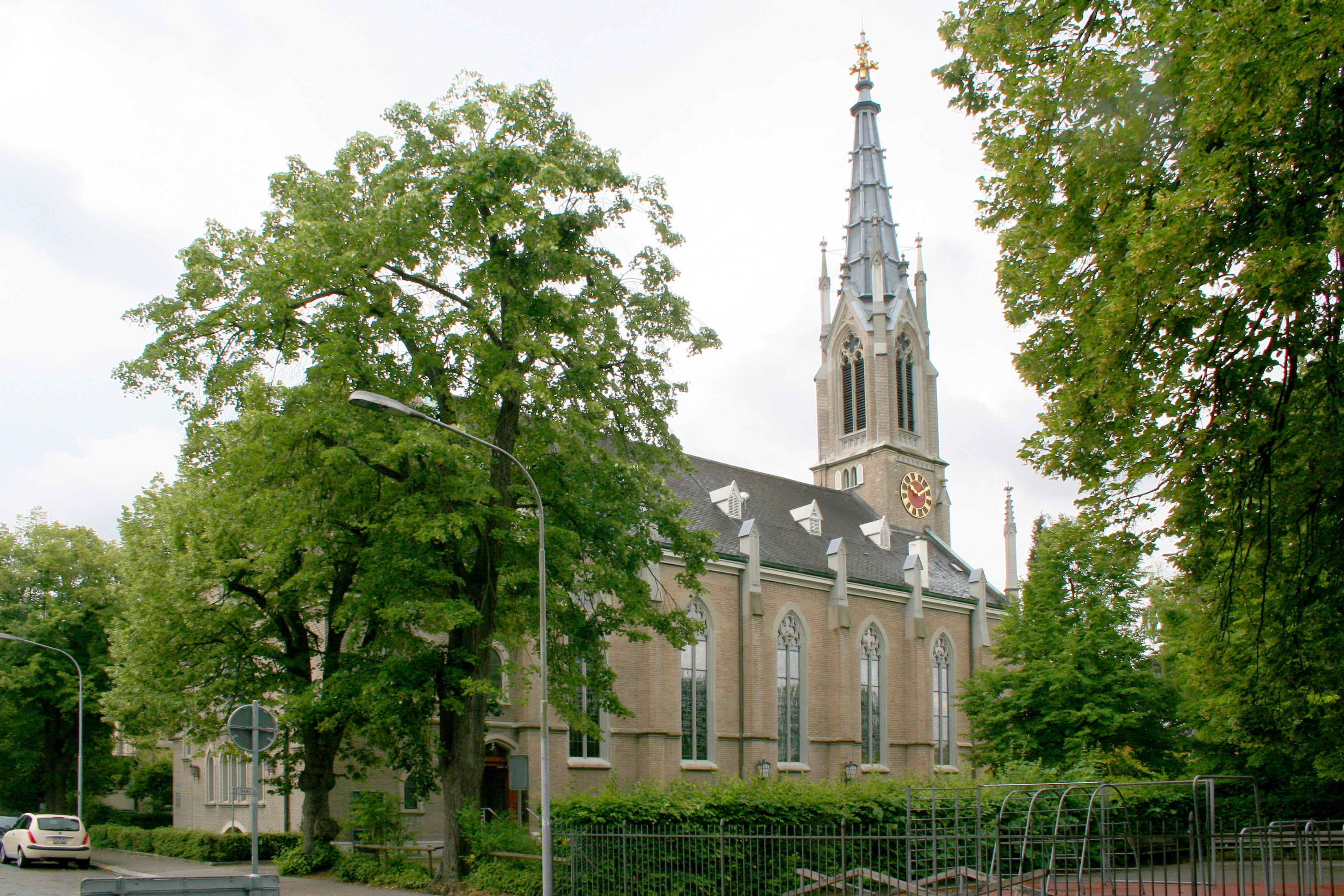 Kirche Zürich Unterstrass, Schweiz. erbaut 1883/1884 nach Plänen von Paul ReberAufnahmestandort Turnerstrasse